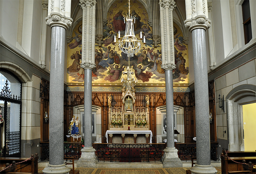 Inneres der Schlosskapelle Mayerling